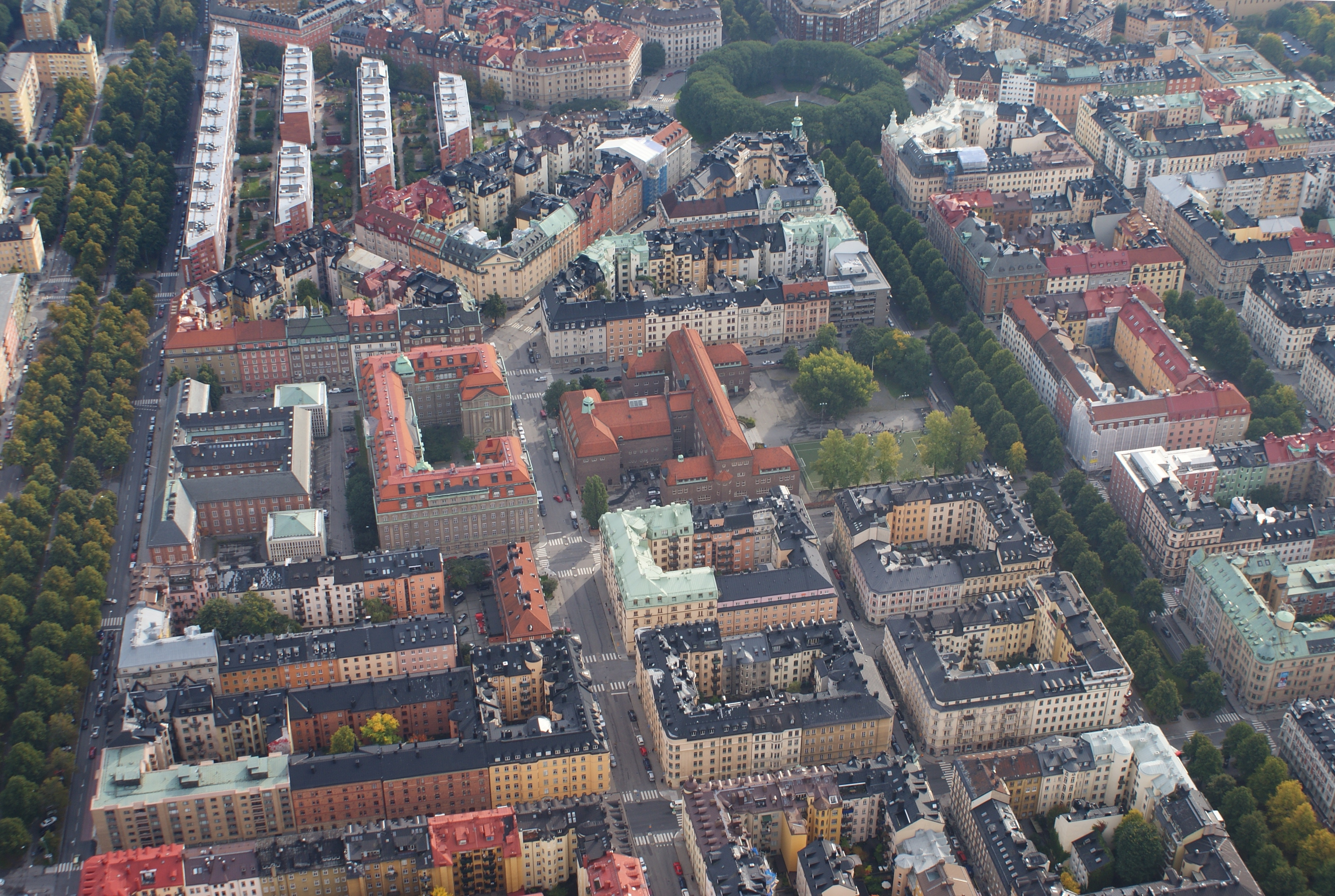 Övre Östermalm sedd från helikopter.